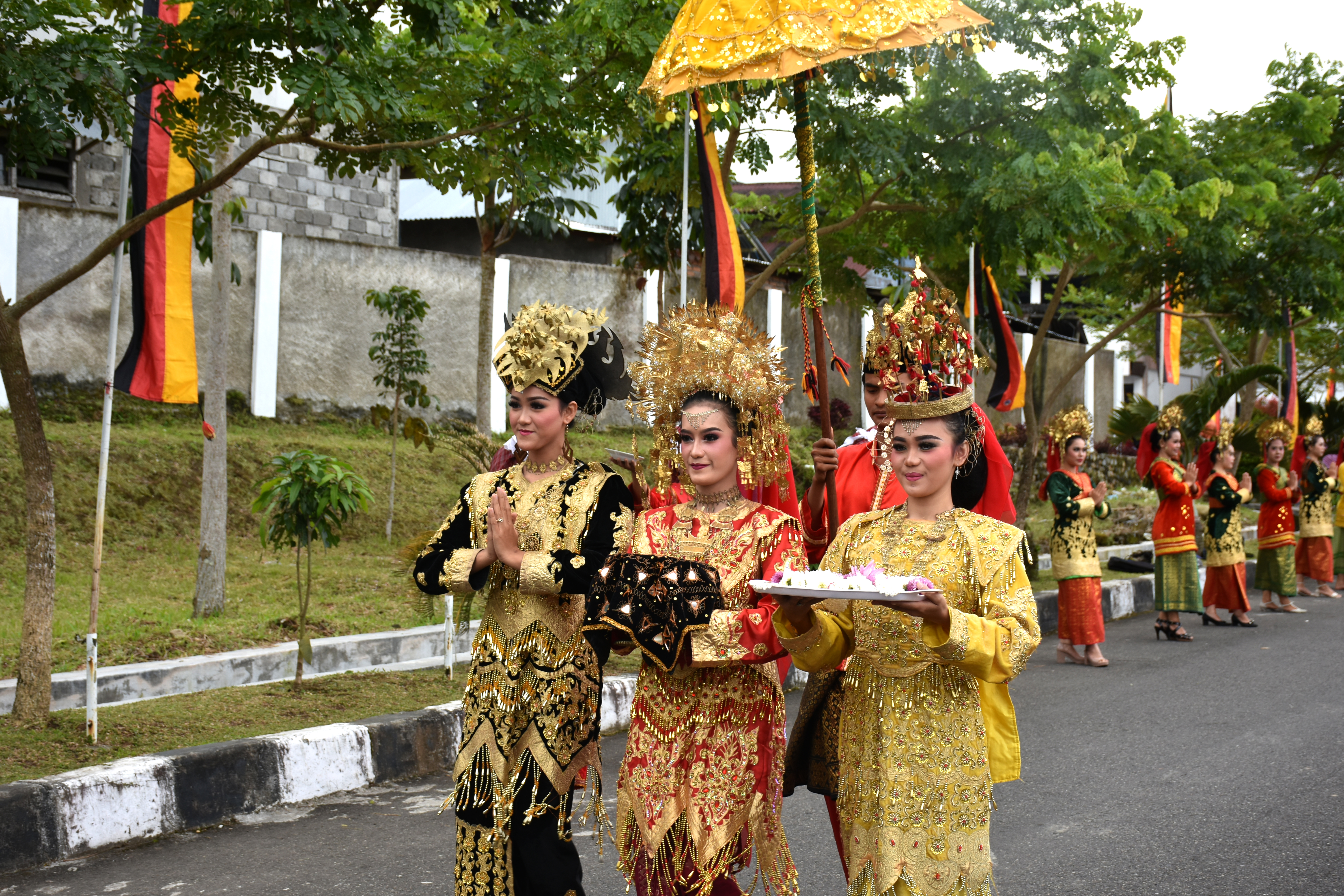 Di Minangkabau, Sumatera Barat Indonesia ada satu upacara adat penyambutan tamu. Pada upacara penyambutan tamu ini terdapat tiga perempuan minang yang salah satunya membawa carano berisikan daun sirih, pinang, gambir dan kapur sirih sebagai suguhan untuk para tamu. Tiga perempuan ini mengunakan pakaian khas adat Minangkabau.